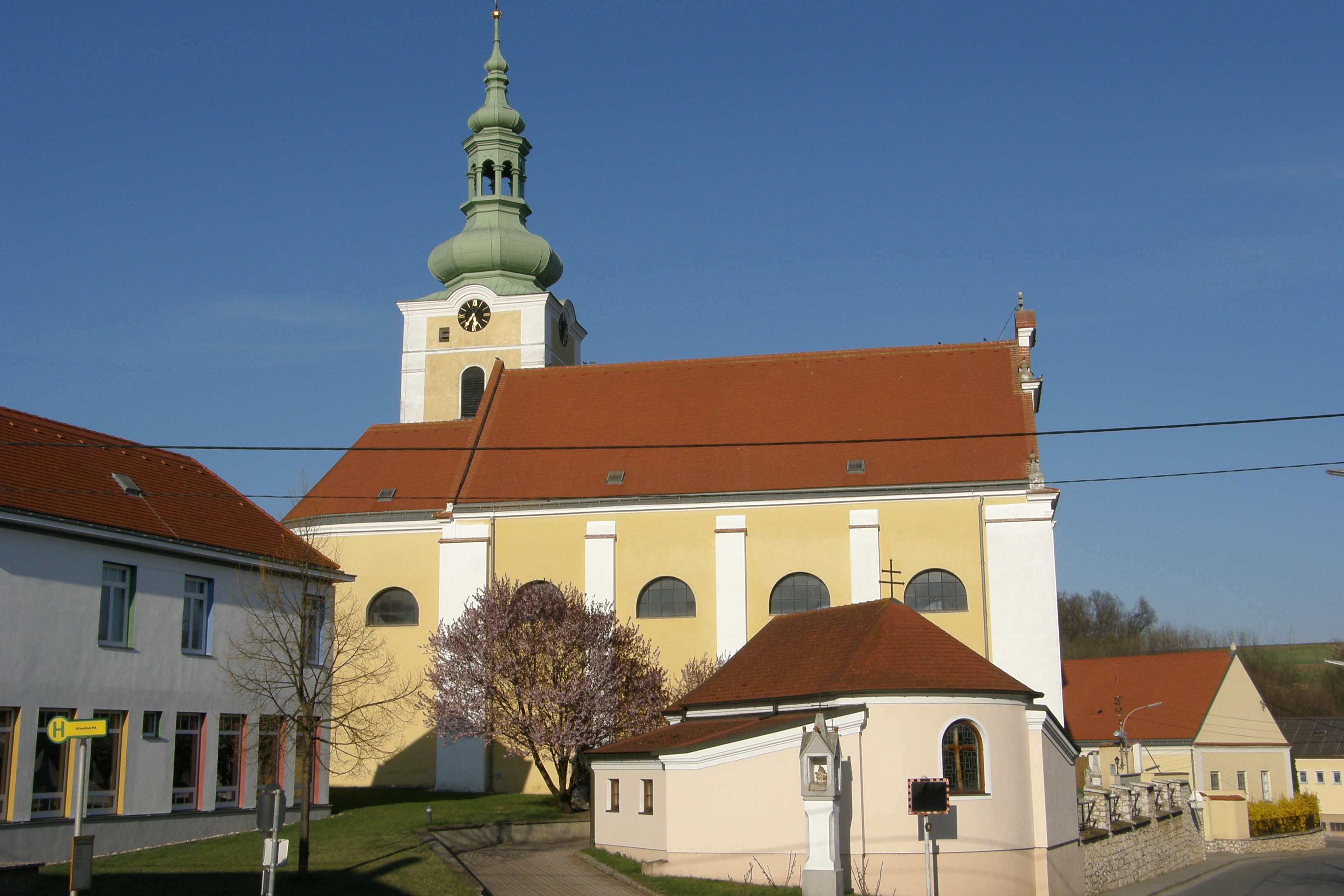 Kath. Pfarrkirche hl. Martin mit ehem. Friedhof